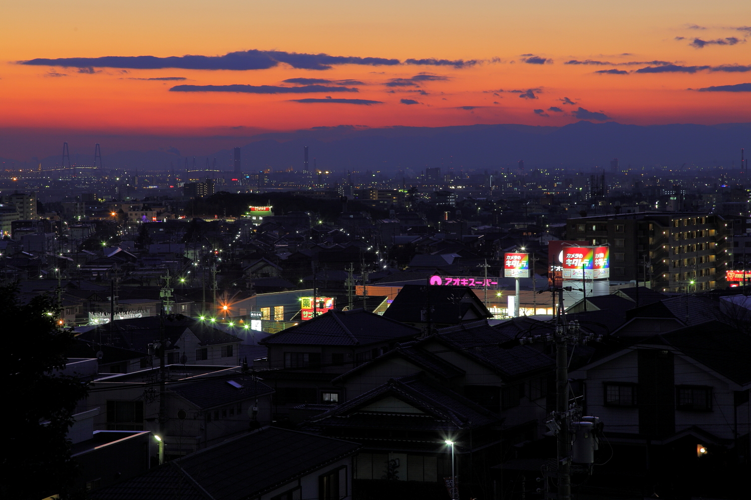 滝の水公園より西南西方向を望む夕景（名古屋市緑区、2011年1月）